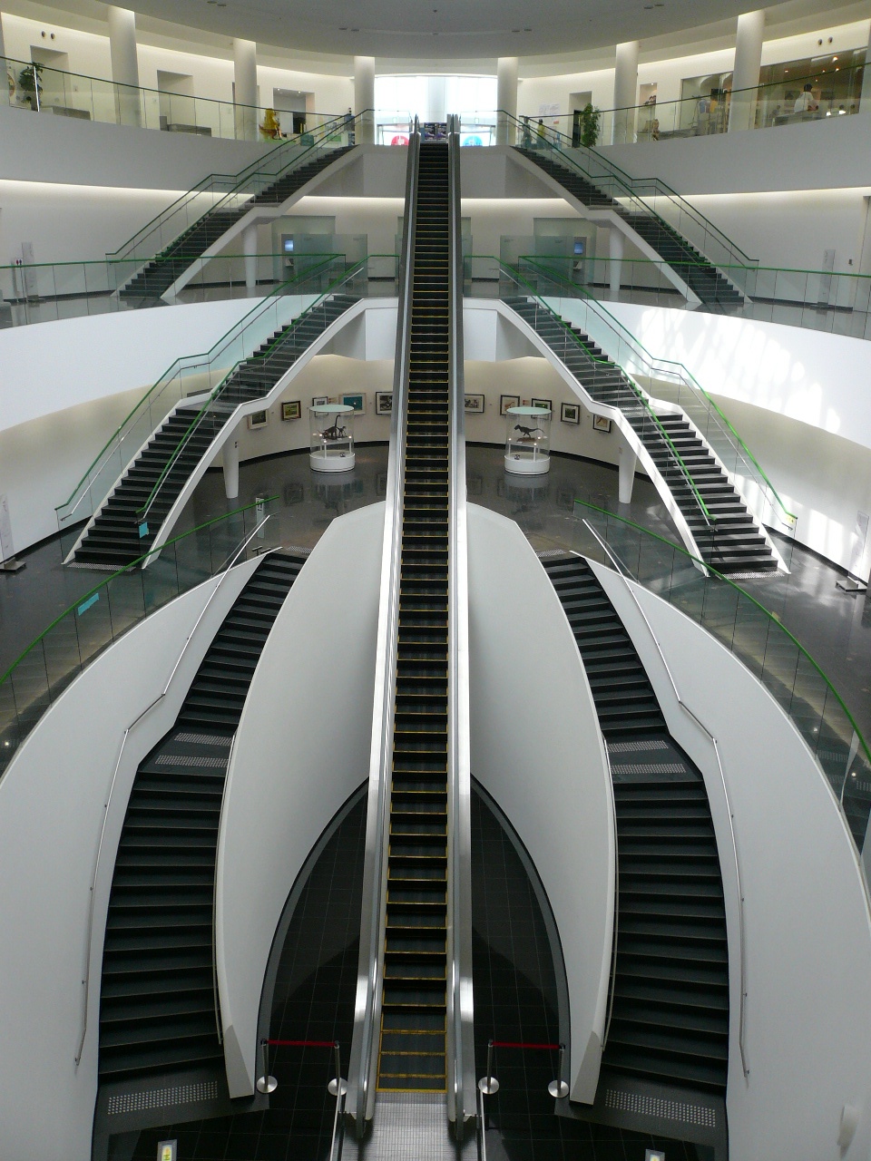 Inside the Fukui Dinosaur Museum